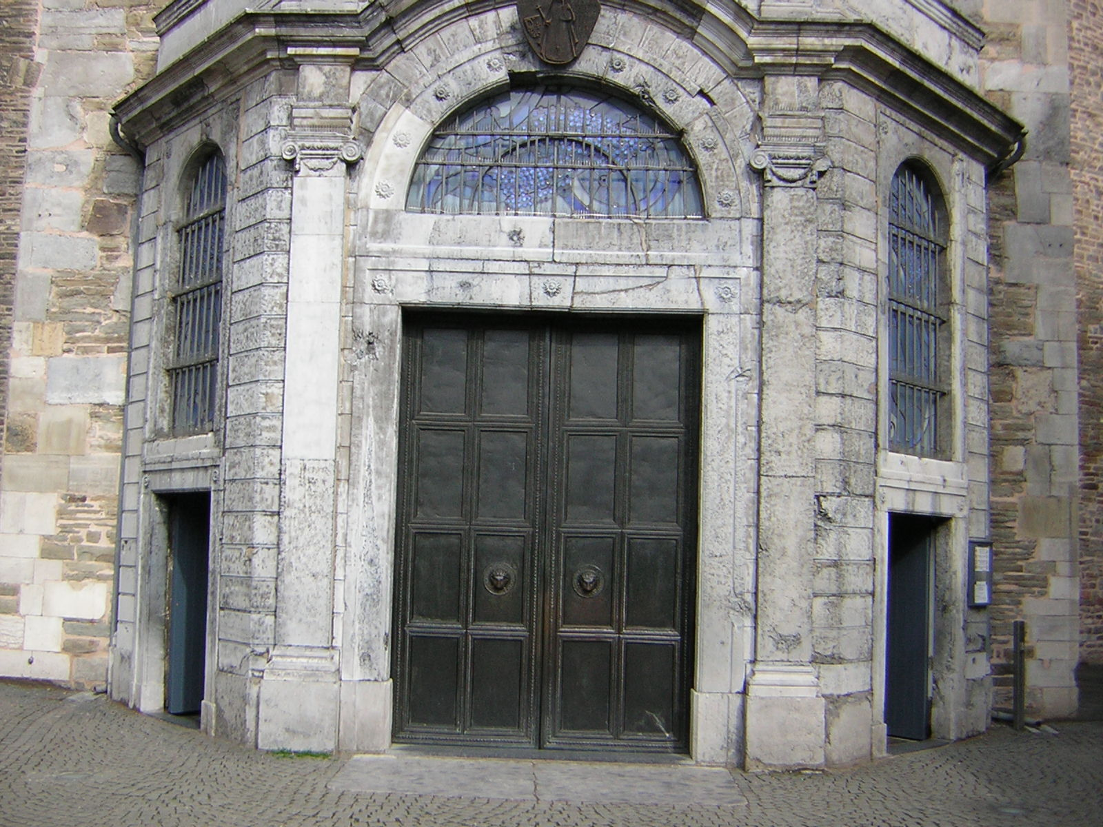 Beschreibung: Haupteingang Aachener Dom in Aachen Fotograf: Trexer Aufgenommen: 2005 mit Nikon Coolpix 2200